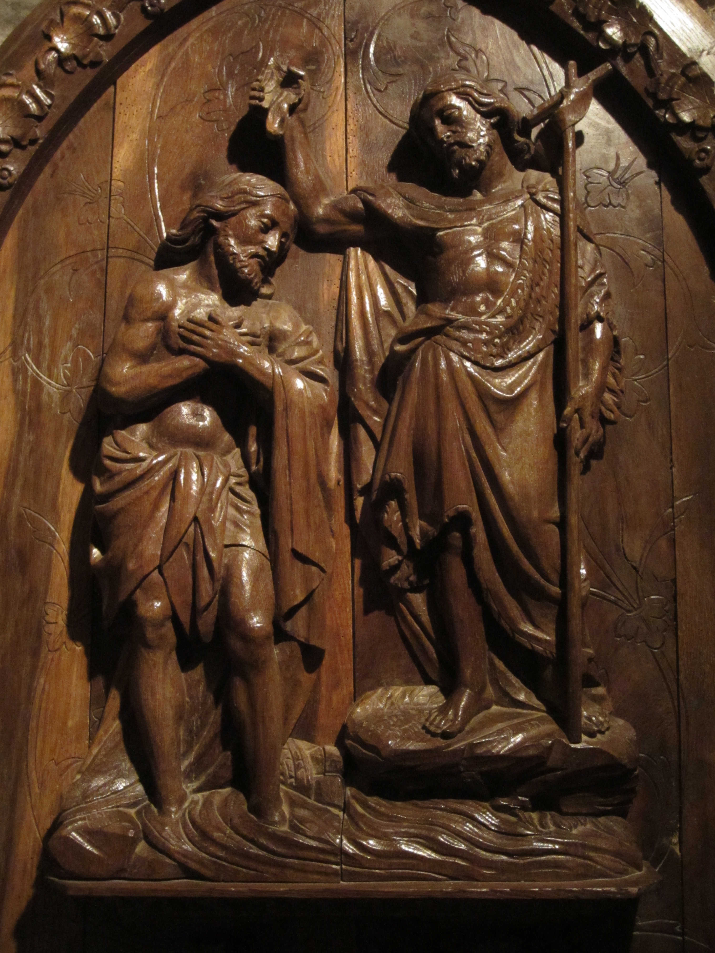 Détail d'une porte dans l'église de Cheylade (Cantal), représentant le baptême du Christ.